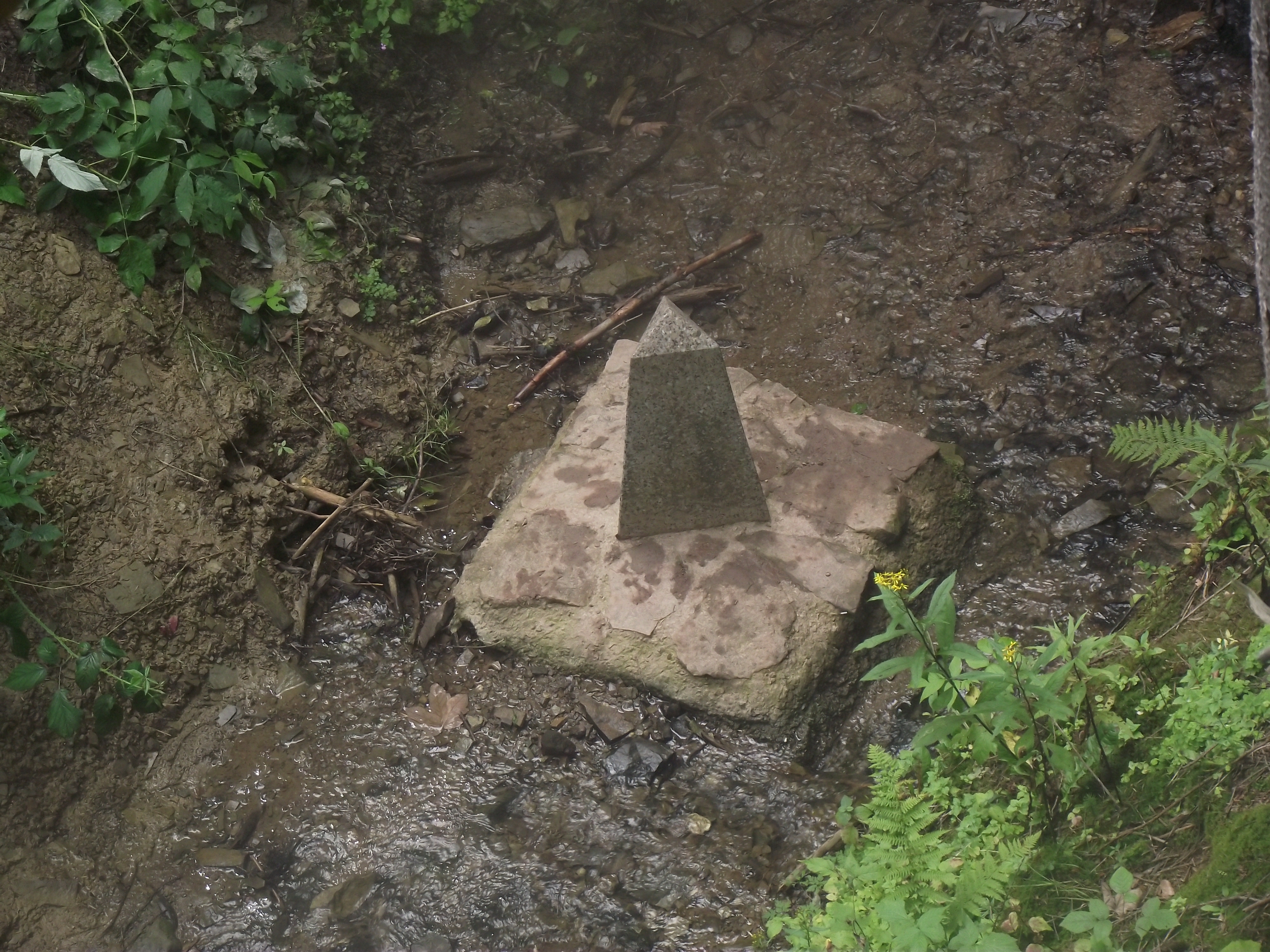 Hraniční obelisk na polsko-česko-slovenském trojmezí.